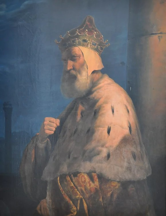 Il doge Pietro Lando, olio su tela, 115 x 89 cm., coll. privata